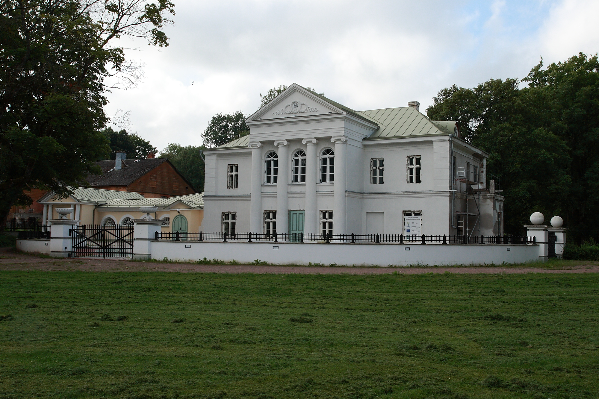 Kumna mõisa uus peahoone, 20.saj